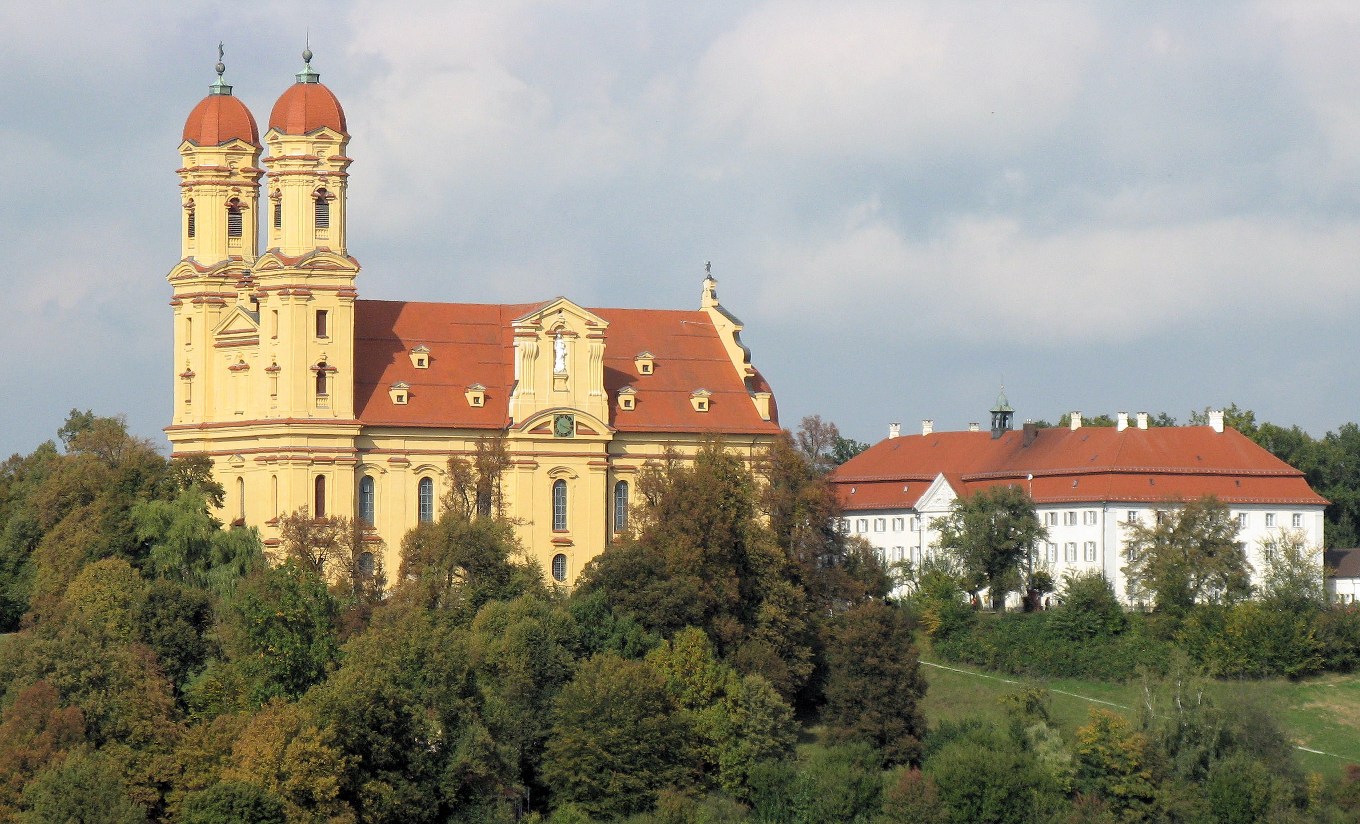 Blick auf die Schönenbergkirche